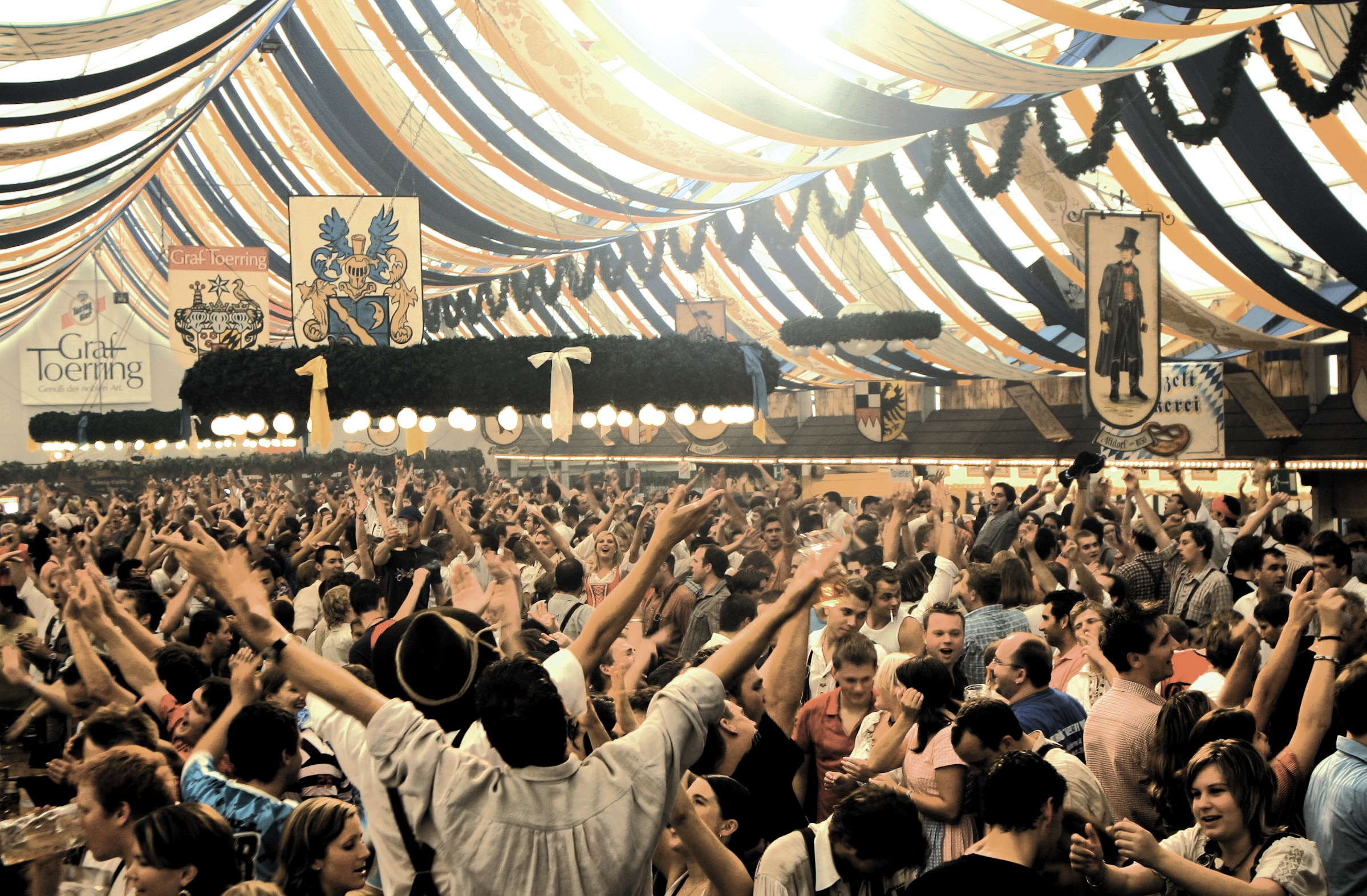 Barthelmarkt